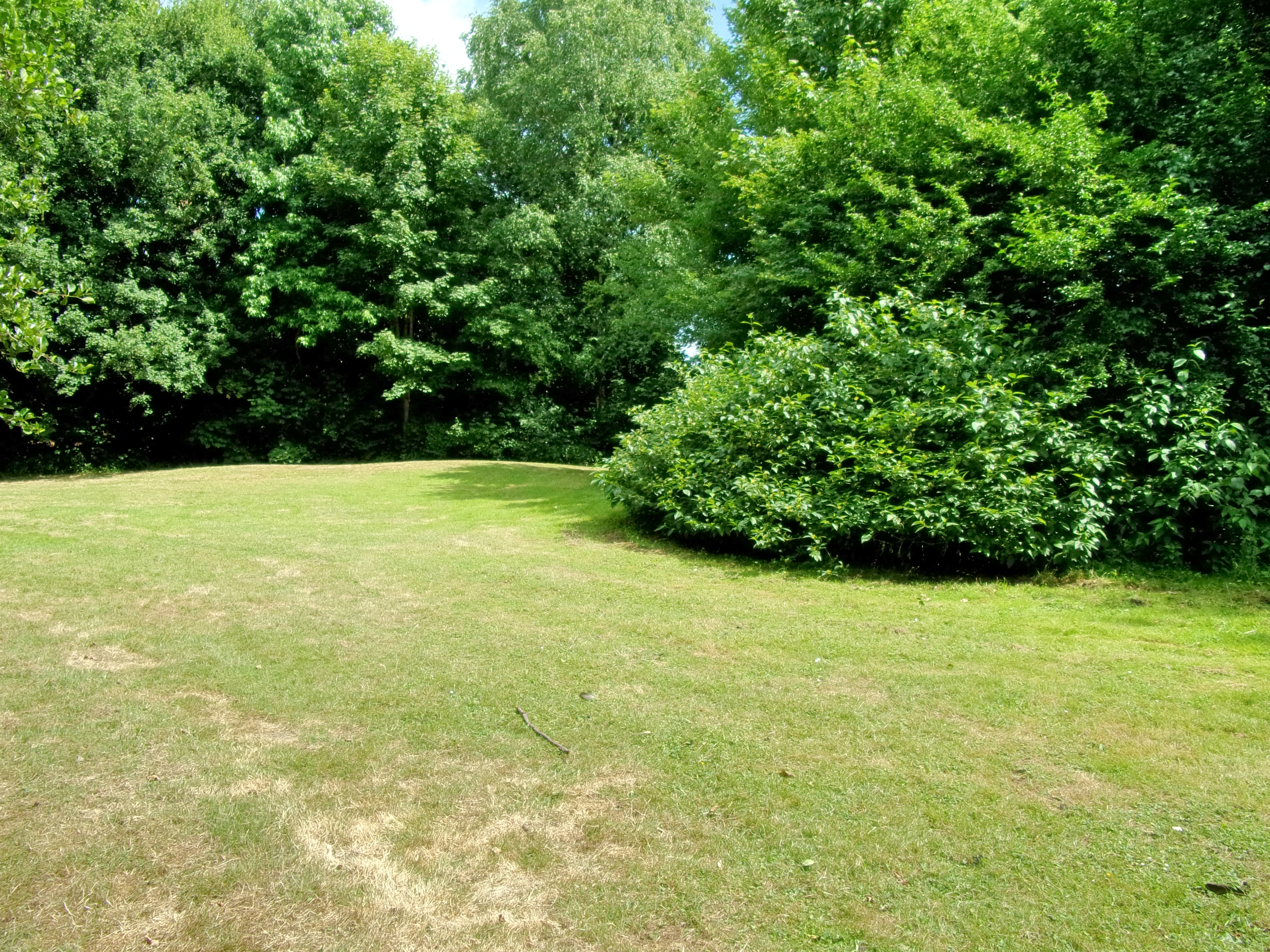 Der Wilhelmsburger Rathauspark befindet sich hinter dem Behördenparkplatz des heutigen Kundenzentrums des Bezirksamtes an der Mengestraße 19. Im Foto eine Teilansicht der kleinen Freifläche rund um das kleine Biotop. Die Wiesenflächen sind sehr kurz gehalten und werden vermutlich regelmäßig gepflegt. Wege oder Bänke gibt es nicht.